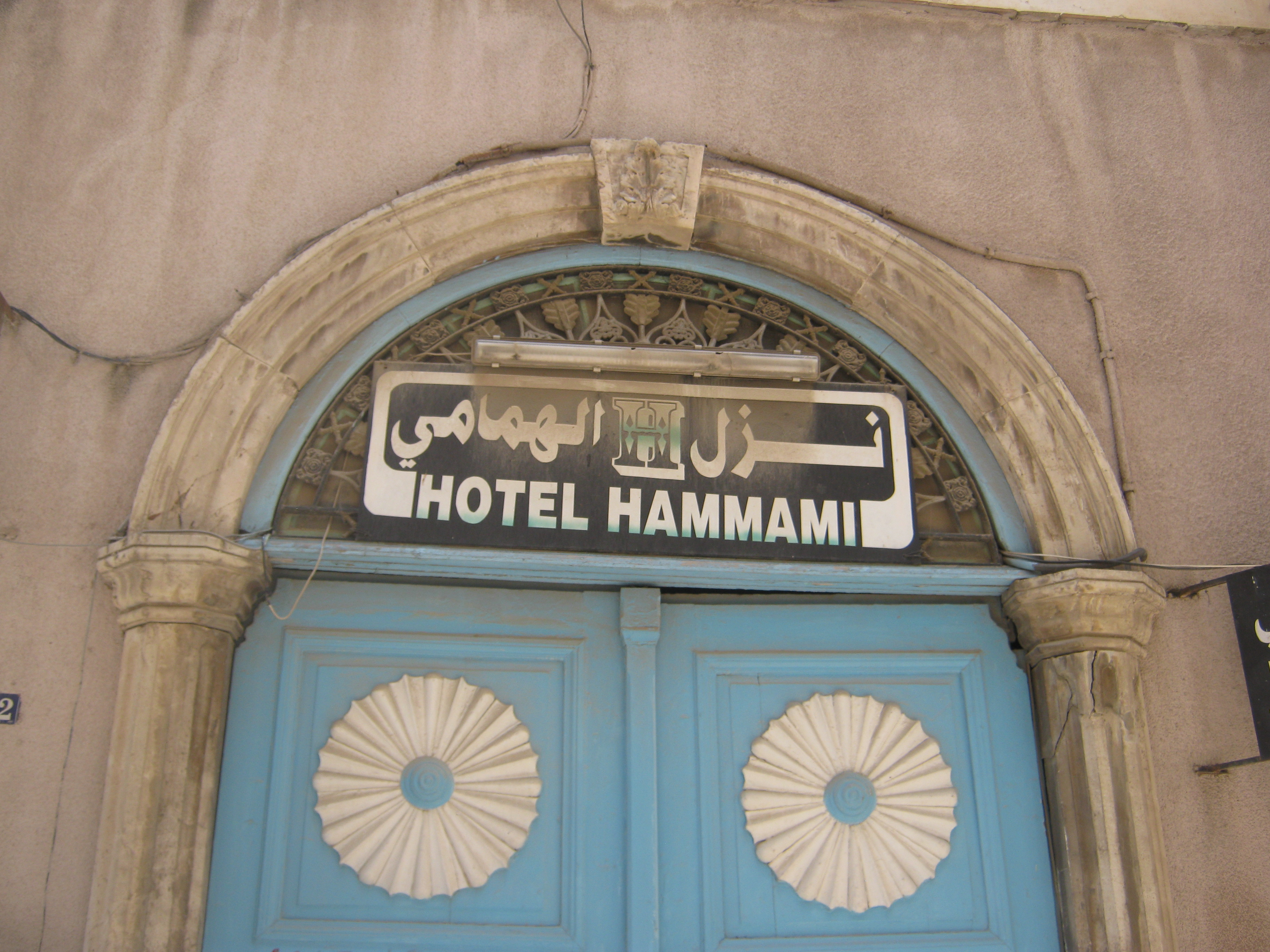 Palais Nessim Samama à Tunis